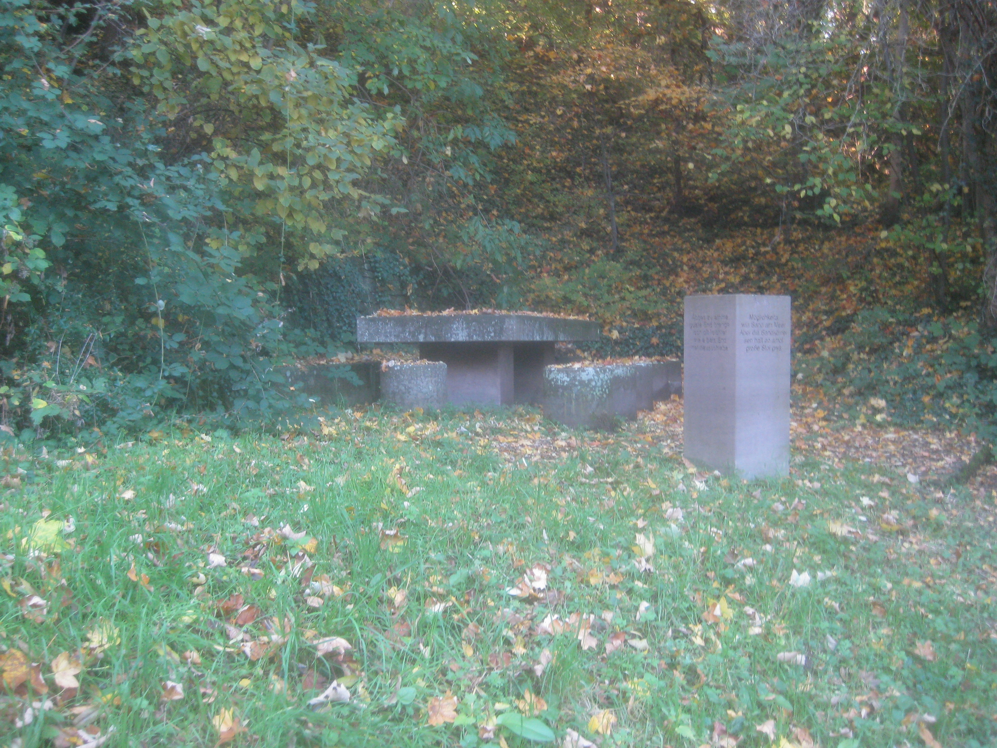 Raststelle und Lyrikstation mit einem Gedicht („Möglichkeita wia Sand am Meer“) von Peter Schlack oberhalb der Kunststation Im Keuper von Hans Dieter Bohnet auf dem Wartberggelände in Stuttgart.